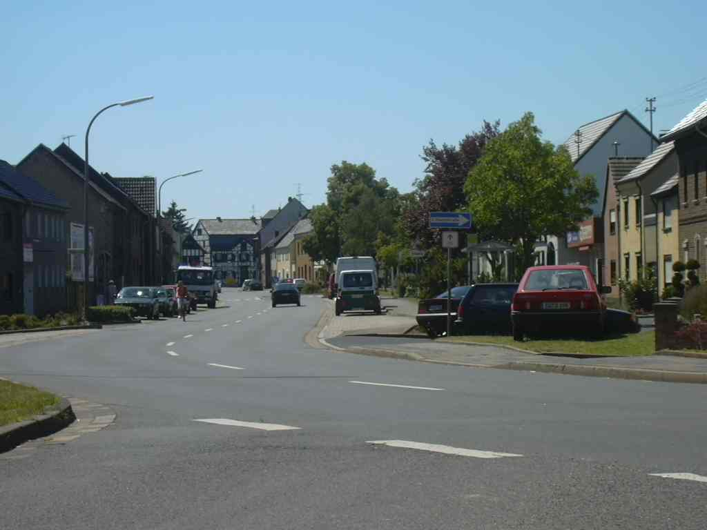 Sinzenich